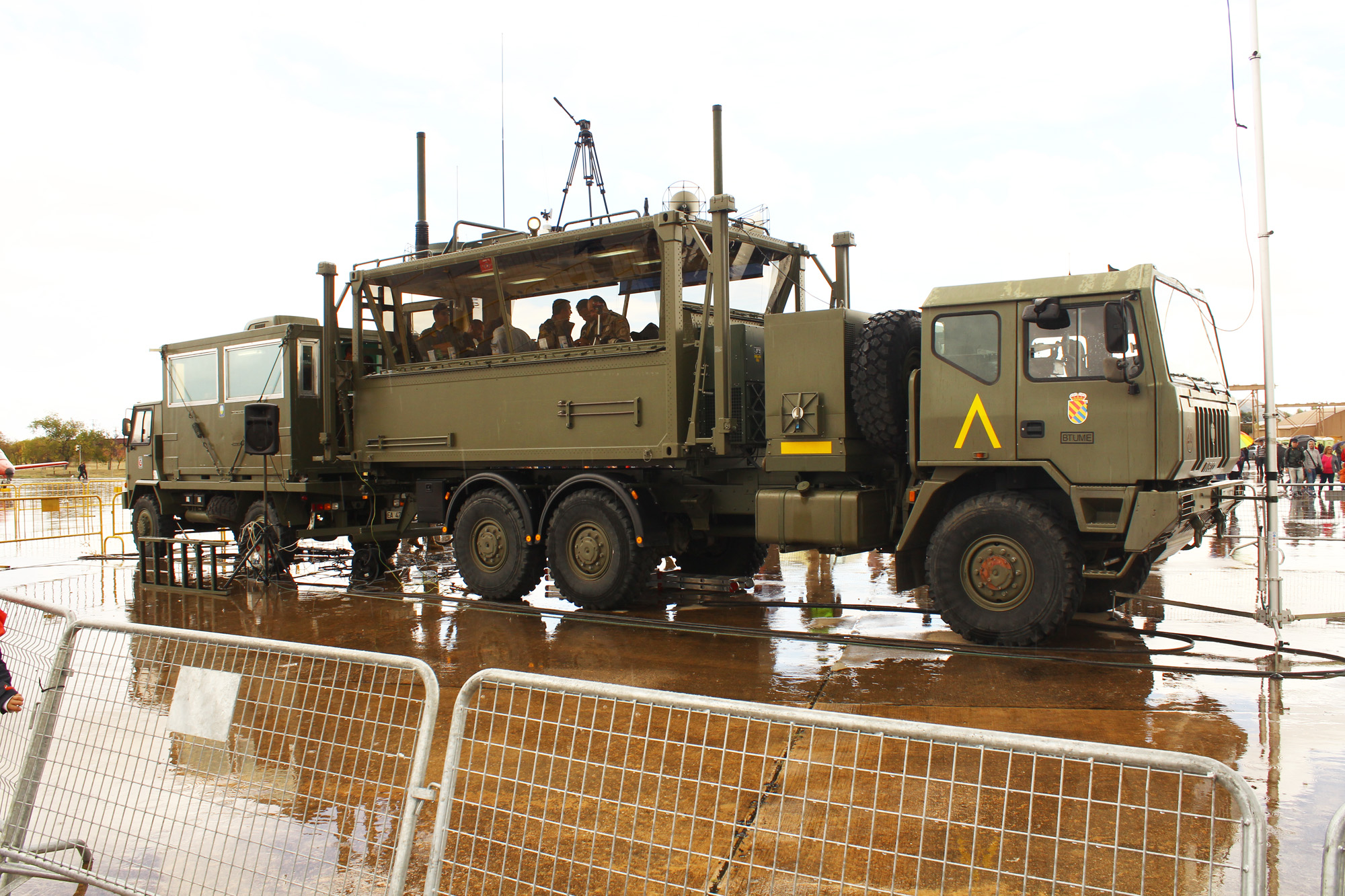 Festival Aéreo Internacional Aire75, celebrado el 11 de octubre de 2014 en la Base Aérea de Torrejón de Ardoz, Madrid, con motivo del 75º aniversario del Ejército del Aire de España. Aire75 International Airshow, held on October 11, 2014 at the Torrejón de Ardoz Air Base, Madrid, to celebrare the 75th anniversary of the Spanish Air Force.